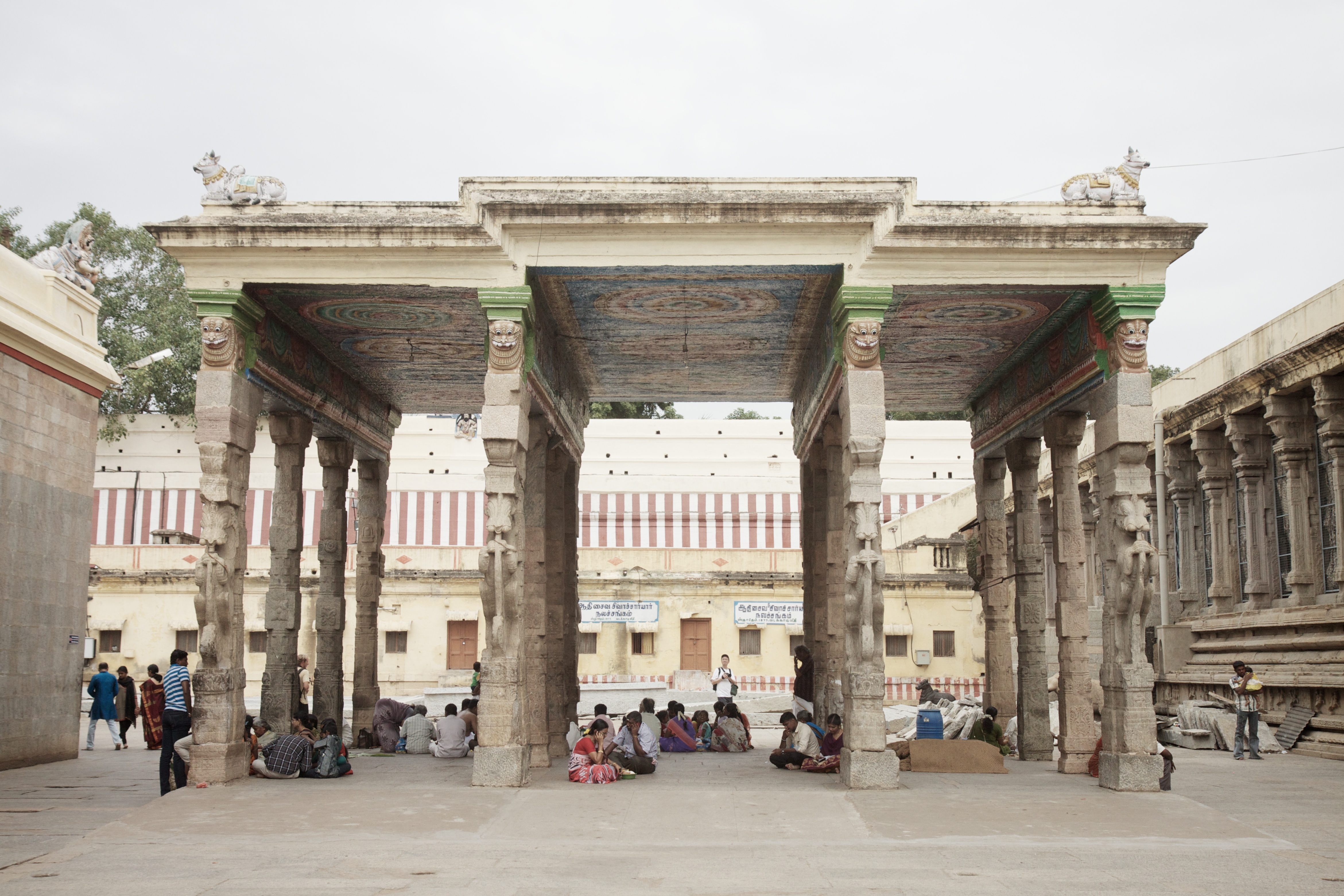 Minakshi Amman temple, Madurai Tamil Nadu